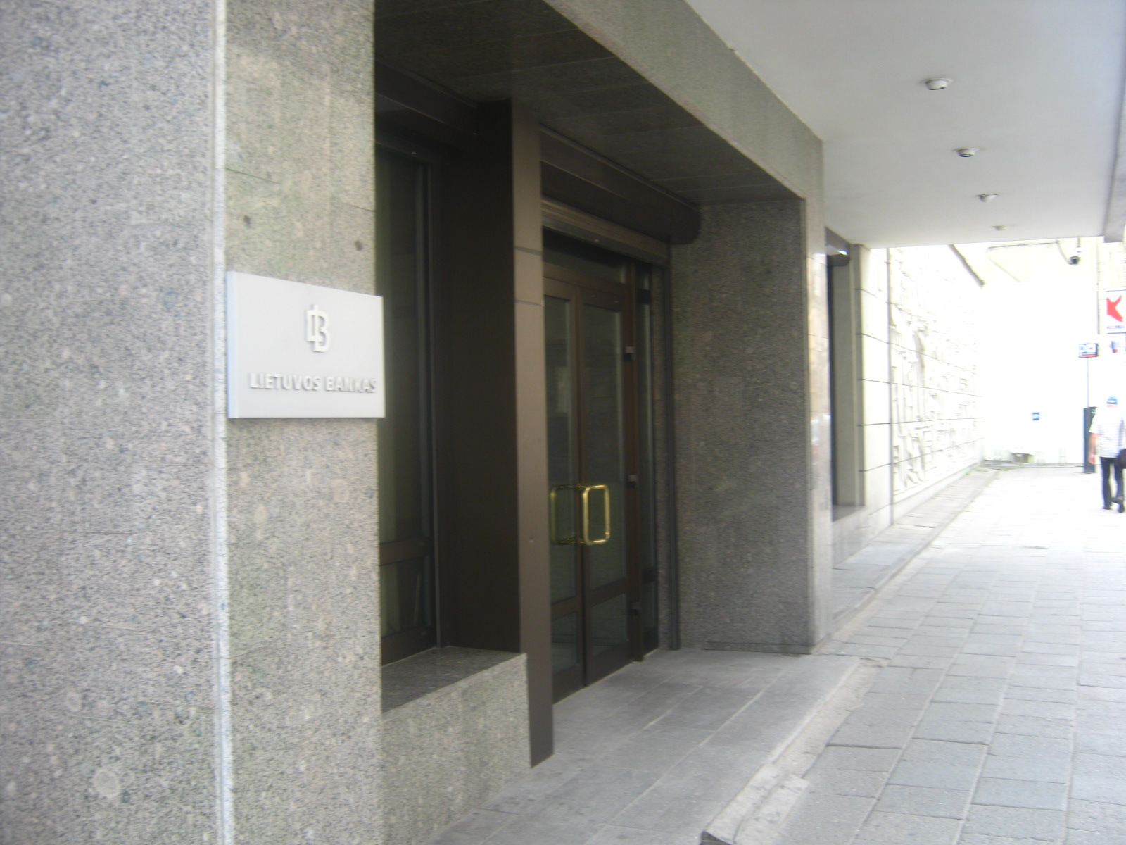 Vilnius